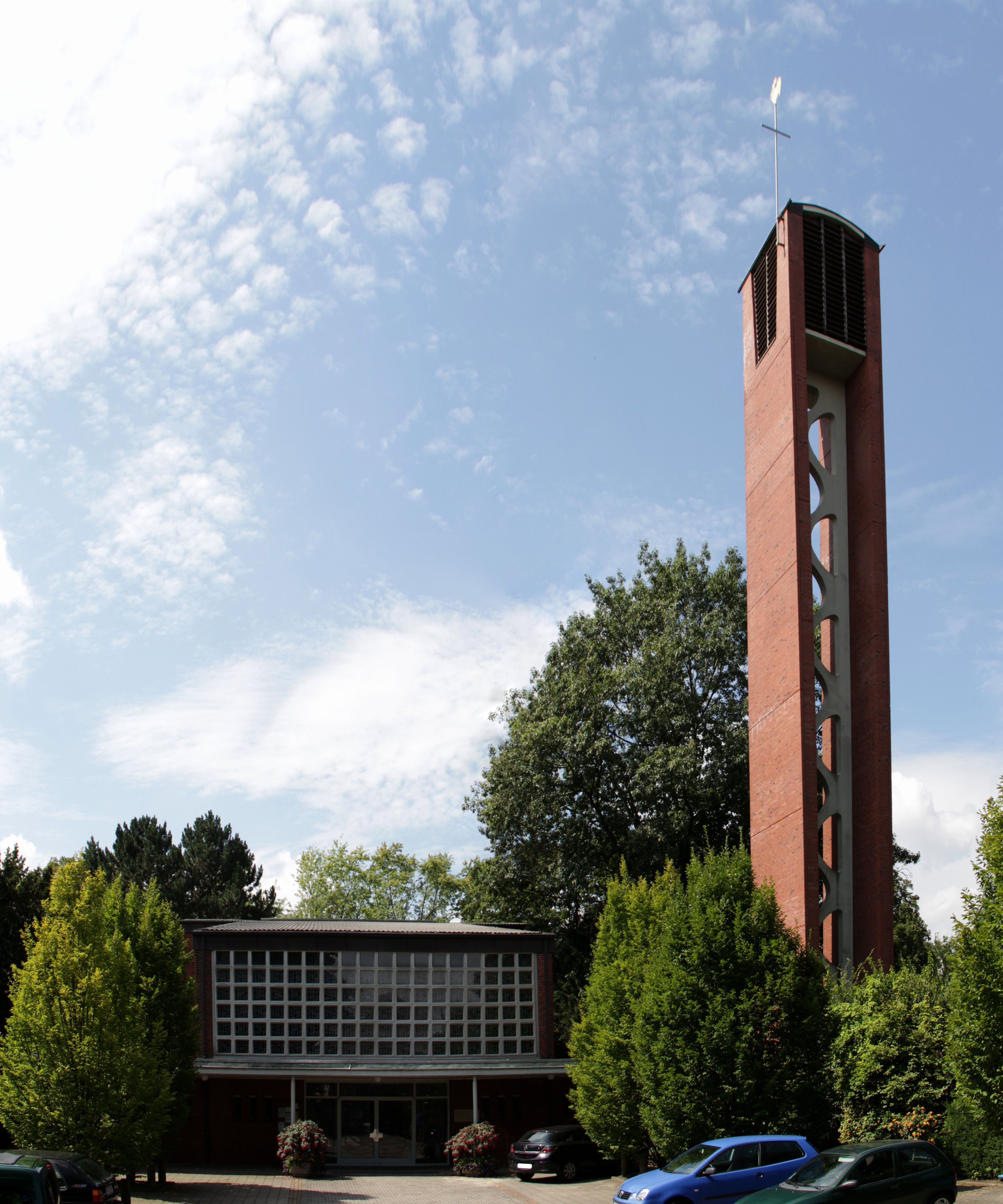 Sankt Maria Heil der Kranken, katholische Klinikkapelle des UKM (Universitätsklinikum Münster)